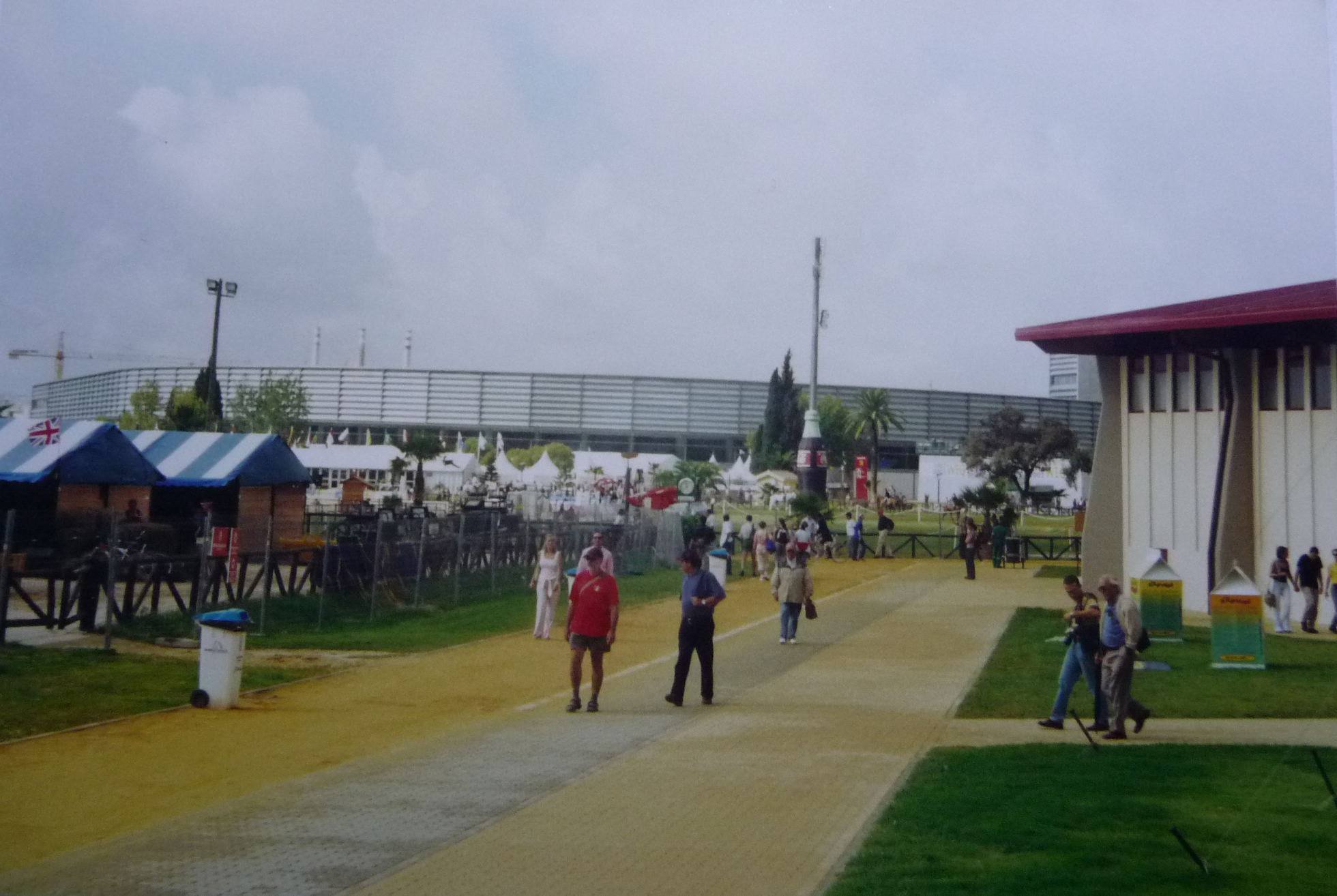 Jerez 2002, Jerez de la Frontera (Andalusia, Spain)